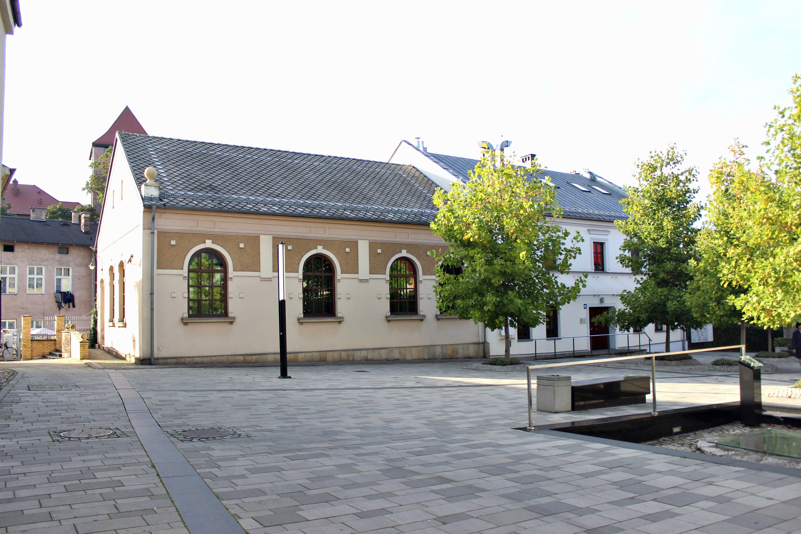 Oświęcim, synagoga, ob. Centrum Żydowskie, 1900